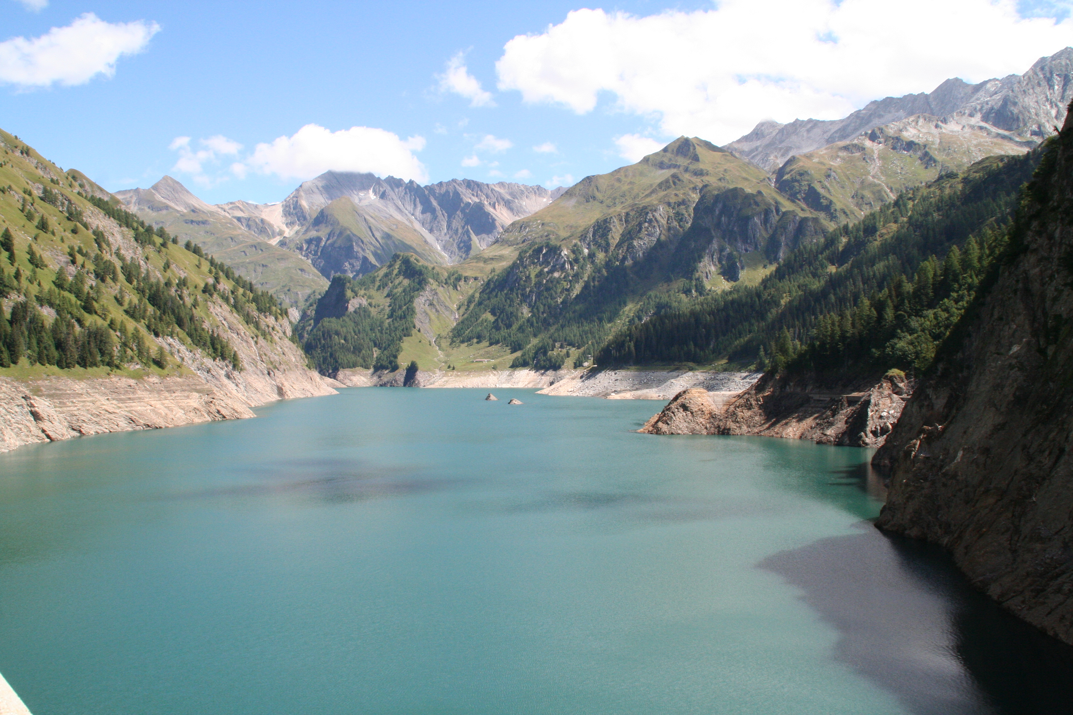 Lago di Luzzone See im August 2011